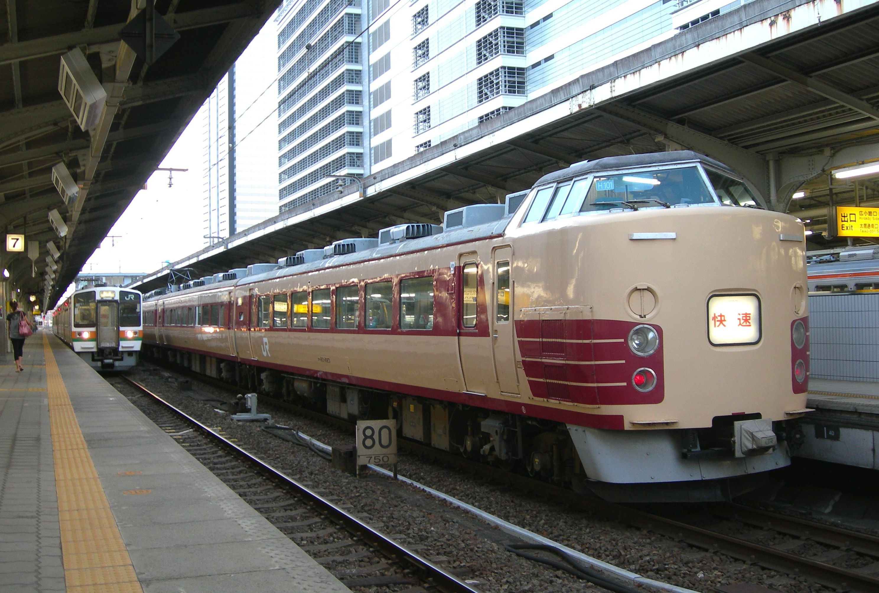 快速ムーンライトながら JR東日本 183系 田町車両センターH101編成